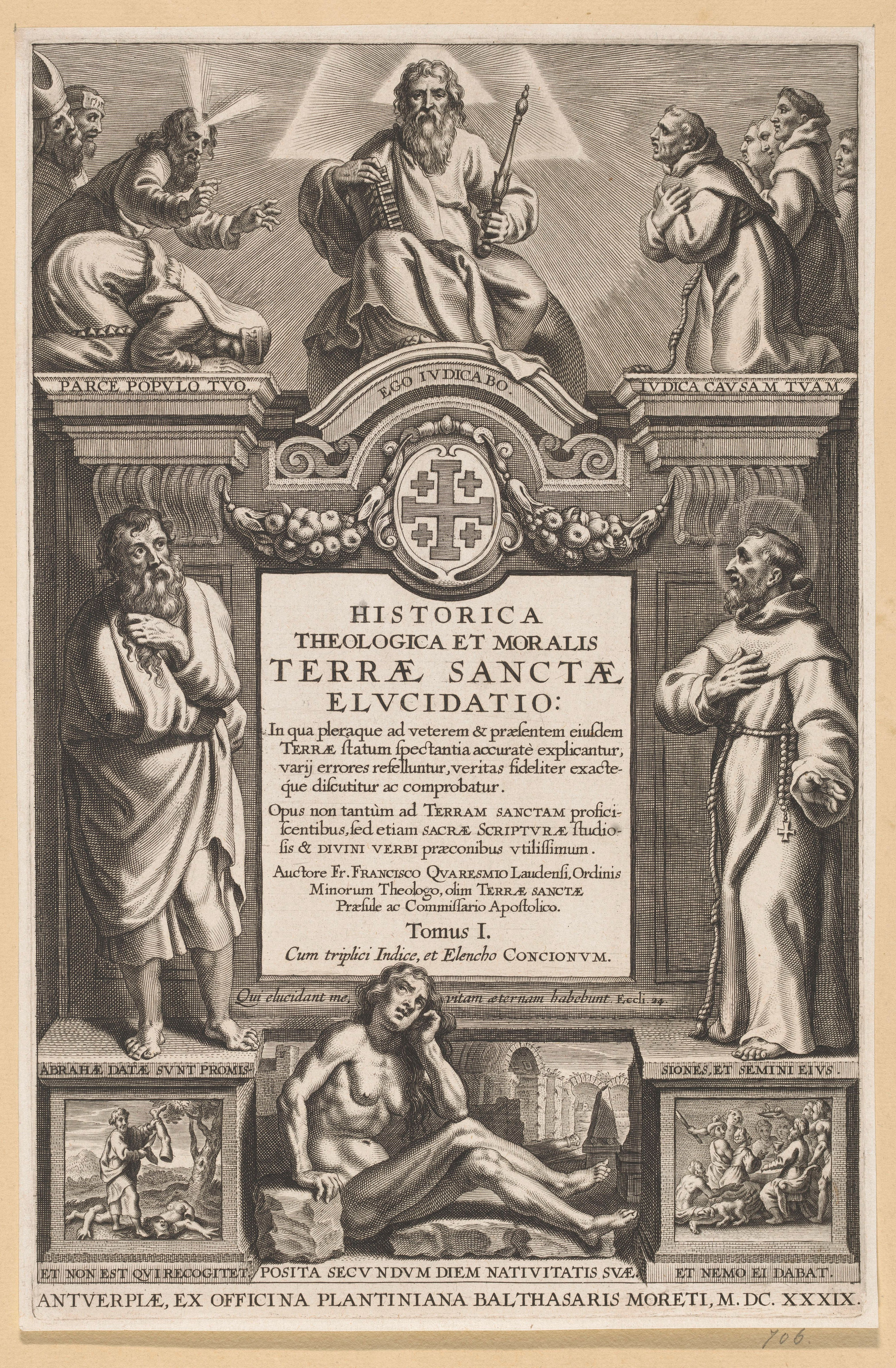 IdentificatieTitel(s): God omringd door bijbelse figuren en heiligeTitelpagina voor F. Quaeresmius, Terrae Sanctae Elucidatio, Antwerpen, 1639Objecttype: prent titelpagina Objectnummer: RP-P-OB-6930Opschriften / Merken: verzamelaarsmerk, verso, gestempeld: Lugt 240Omschrijving: God de Vader tronend op een piëdestal, met scepter en boek in zijn handen. Links Mozes, Aaron en Zacharias. Rechts vertegenwoordigers van de bedelordes. In het midden een wit vlak voor de titel van het boek. Erboven een wapen met een groot Grieks kruis en vier kleinere kruizen.VervaardigingVervaardiger: prentmaker: Cornelis Galle (I)naar ontwerp van: Peter Paul Rubens (verworpen toeschrijving)naar ontwerp van: Erasmus Quellinus (II)uitgever: Balthasar Moretus (I) (vermeld op object)Plaats vervaardiging: prentmaker: Zuidelijke Nederlandenuitgever: AntwerpenDatering: 1639Fysieke kenmerken: gravureMateriaal: papier Techniek: graveren (drukprocedé)Afmetingen: plaatrand: h 332 mm × b 206 mmToelichtingTitelpagina voor F. Quaeresmius, Terrae Sanctae Elucidatio, Antwerpen, ex officina Plantiniana, B. Moretus, 1639.OnderwerpWat: God the Father (as bearded old man) enthroned, usually with crown or tiara, and with sceptre and/or globegroups of persons from the Old TestamentVerwerving en rechtenVerwerving: overdracht van beheer 1816Copyright: Publiek domein